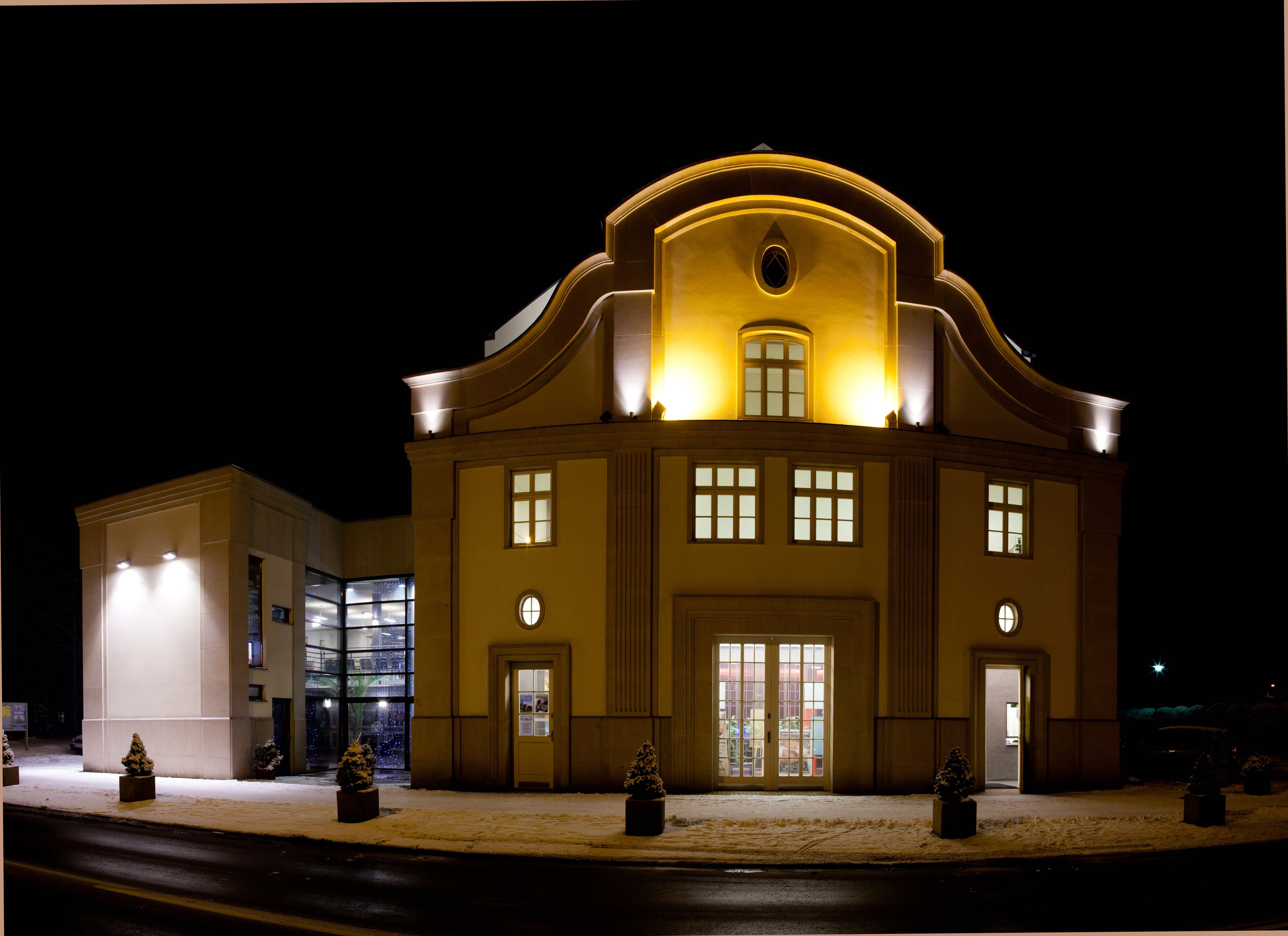 Miejski Dom Kultury - Czechowice-Dziedzice nocą. Budynek po remoncie.